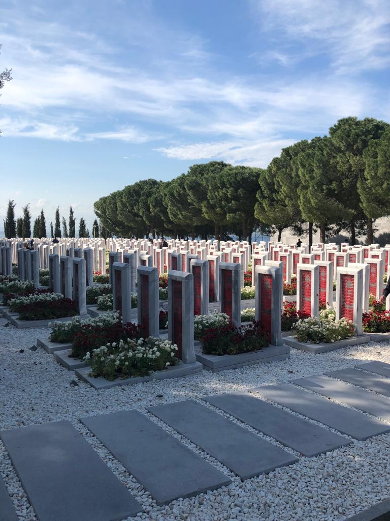 (قبور شهداء معركة جناق قلعة (حملة جاليبولي